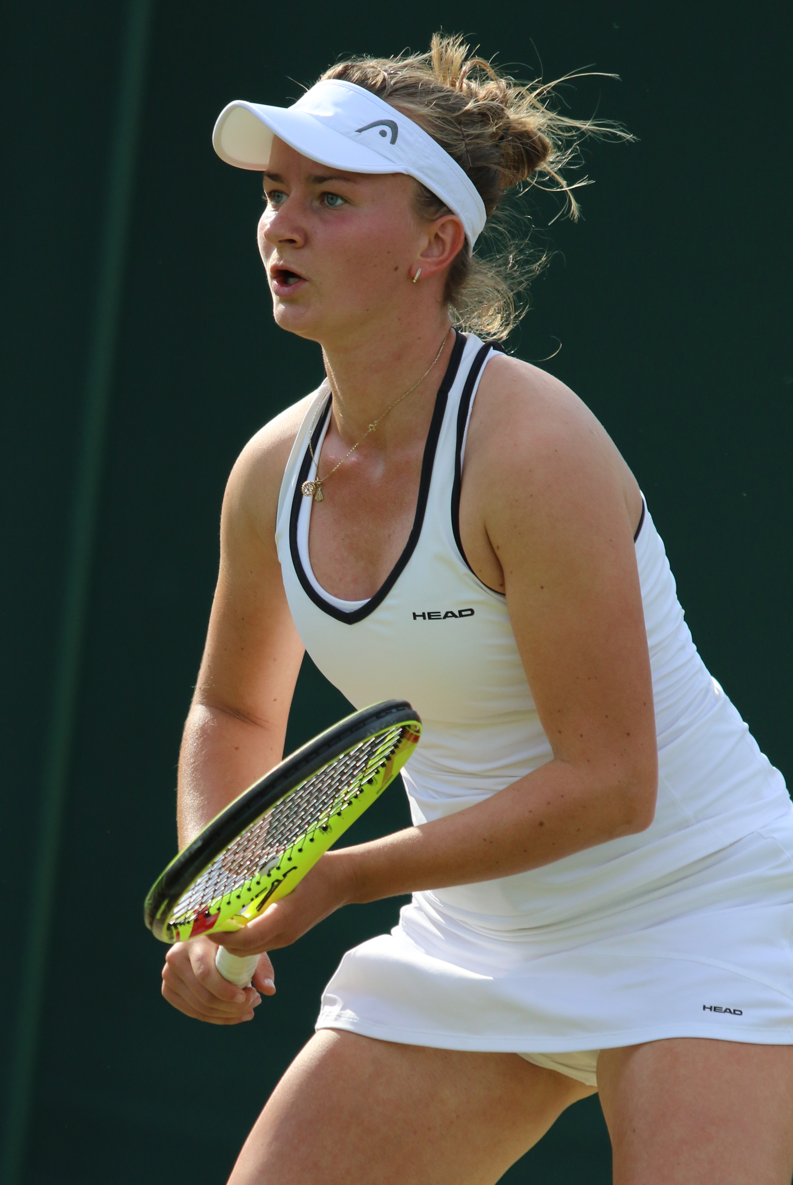 Krejcikova WM17 (5)